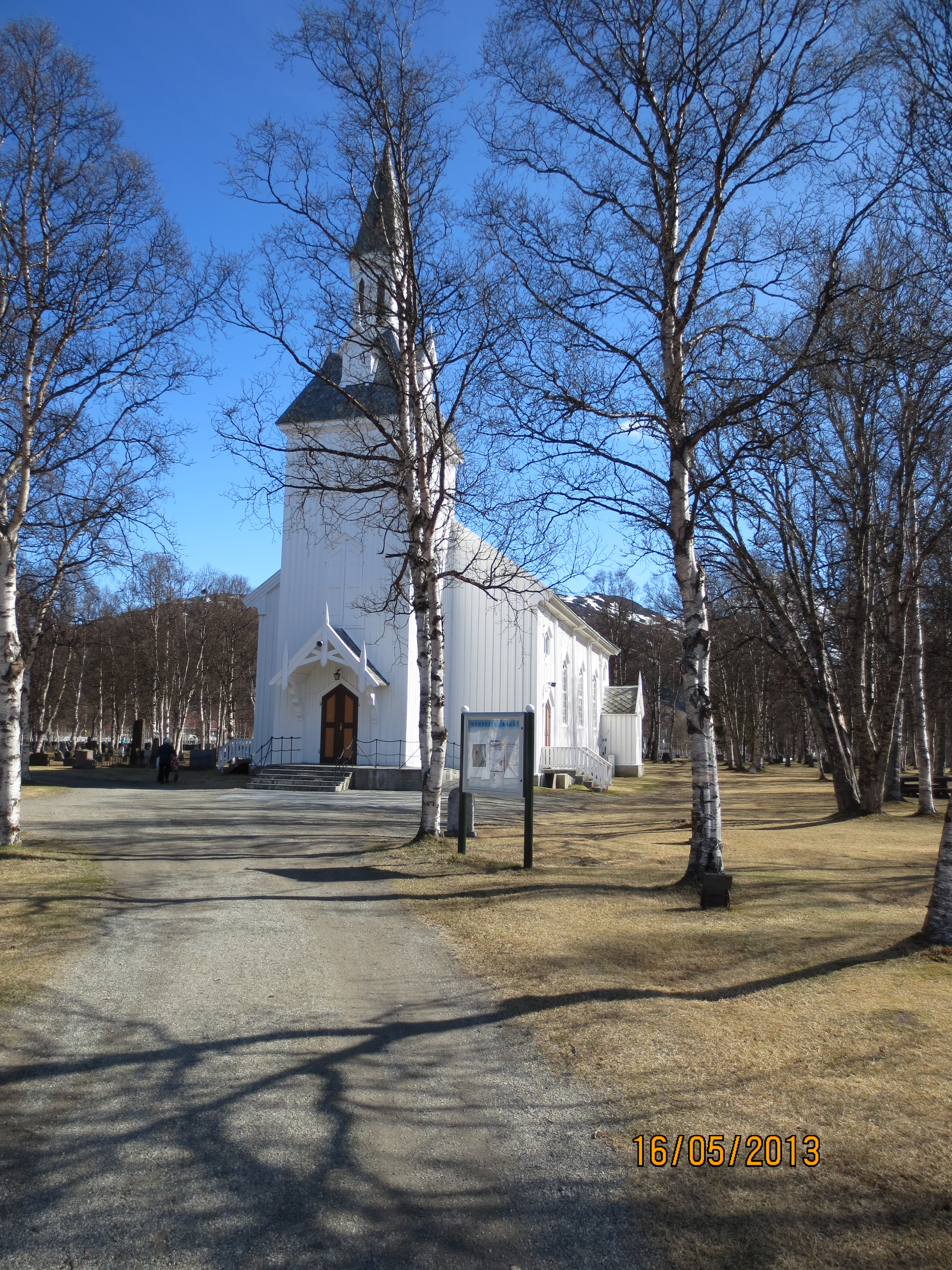 Nordreisa kirke,Nordreisa kommune